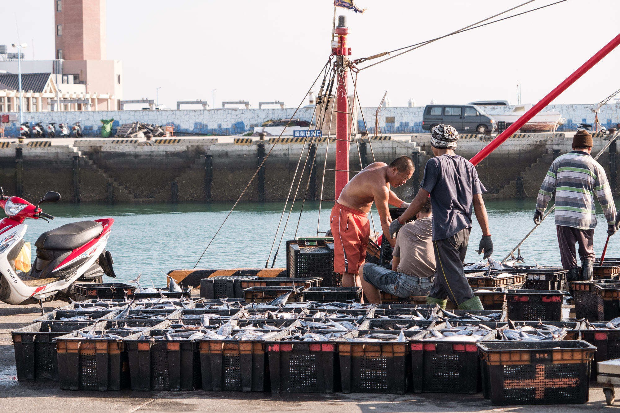 赤崁